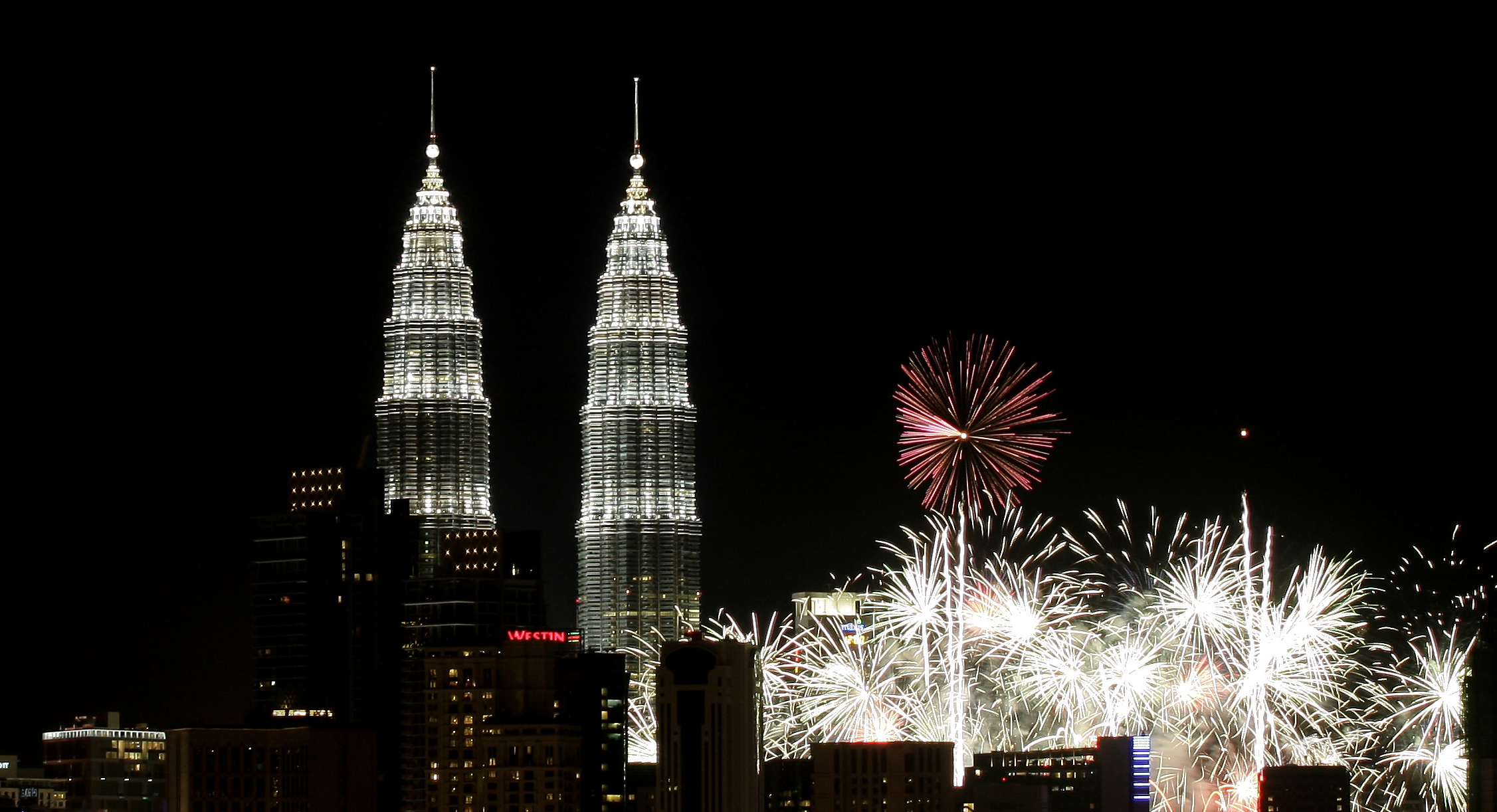 MALAM TAHUN BARU